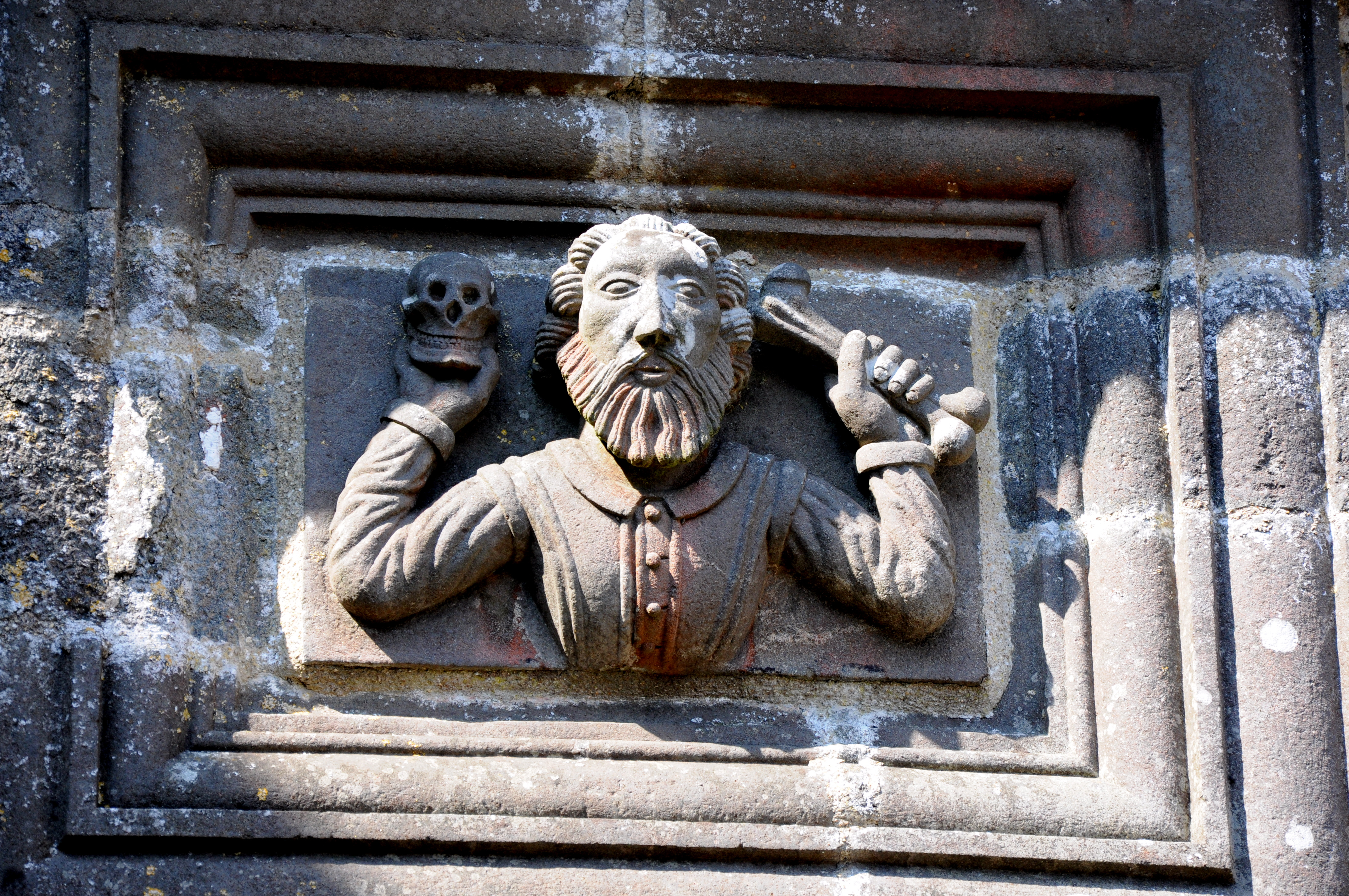 Enclos paroissial de La Martyre, détail de la façade méridionale de l'ossuaire d'attache de l'église Saint-Salomon.